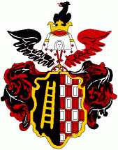 Znak města Lázně Bohdaneč staženo ze stránek města Lázně Bohdaneč